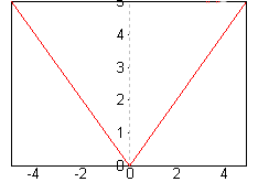 Représentation graphique de la fonction valeur absolue. Image personnelle créée ave gnuplot et gimp.